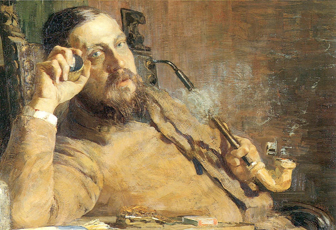 Vittore Grubicy (Ausschnitt), 1887, 151x91cm, Museum der Bildenden Künste, Leipzig